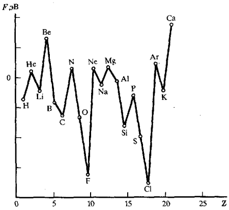 Зависимость сродства к электрону атома от атомного номера элемента